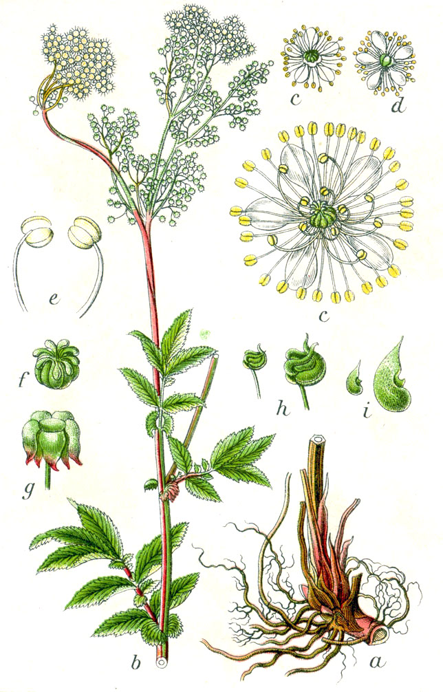 Filipendula ulmaria (L.) Maxim. Original Caption Mädesüss, Filipendula ulmaria